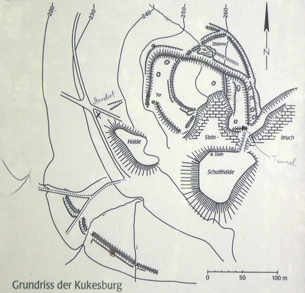 Skizze der Kukesburg unterhalb der Burganlage (nach Schünemann)